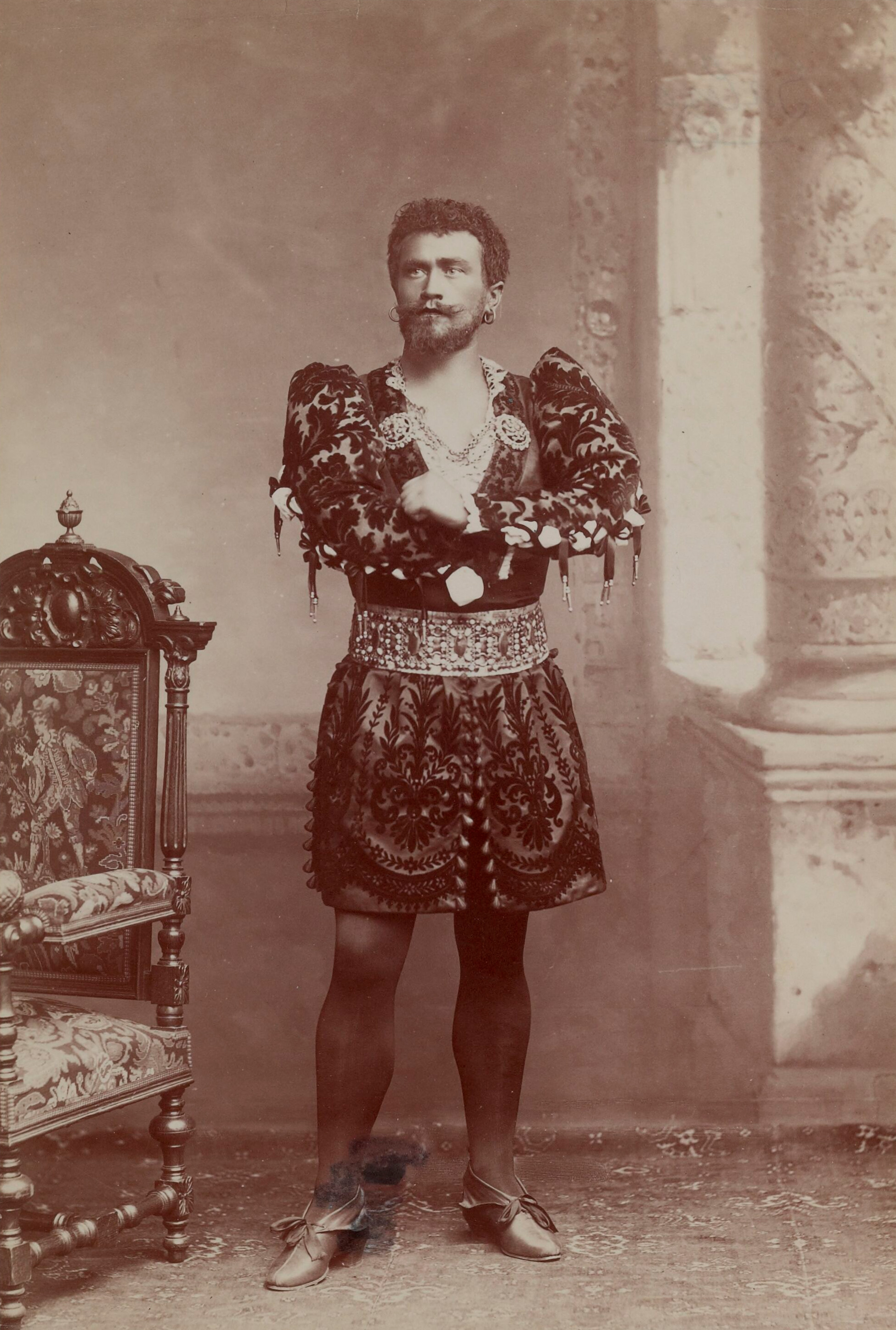 Albert Saléza dans le rôle d'Otello de Verdi